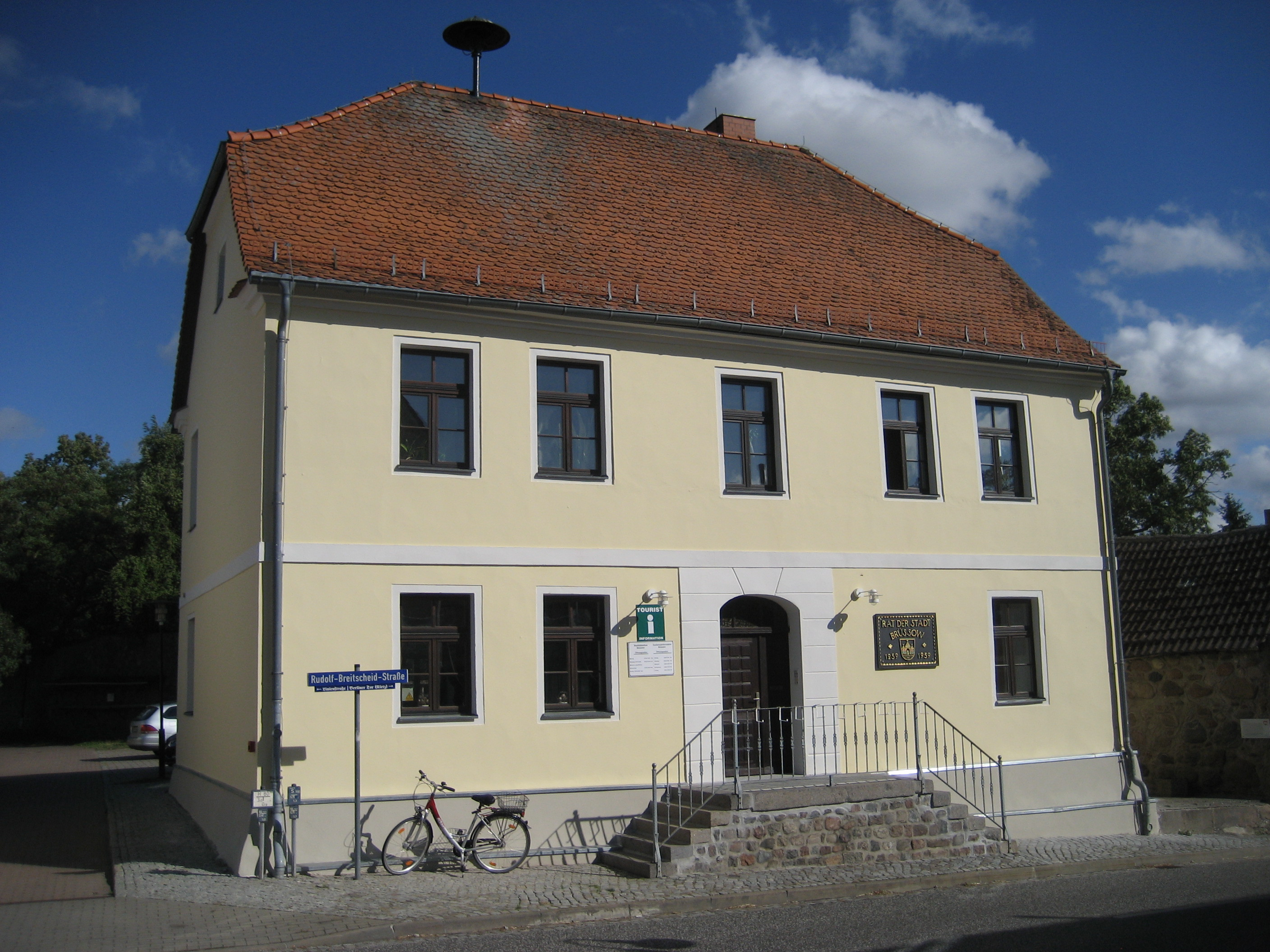 Das Alte Rathaus von Brüssow. Ursprünglich Torschreiberhaus, dann Rathaus, heute Sitz der Touristeninformation, der Bibliothek und des Standesamtes.